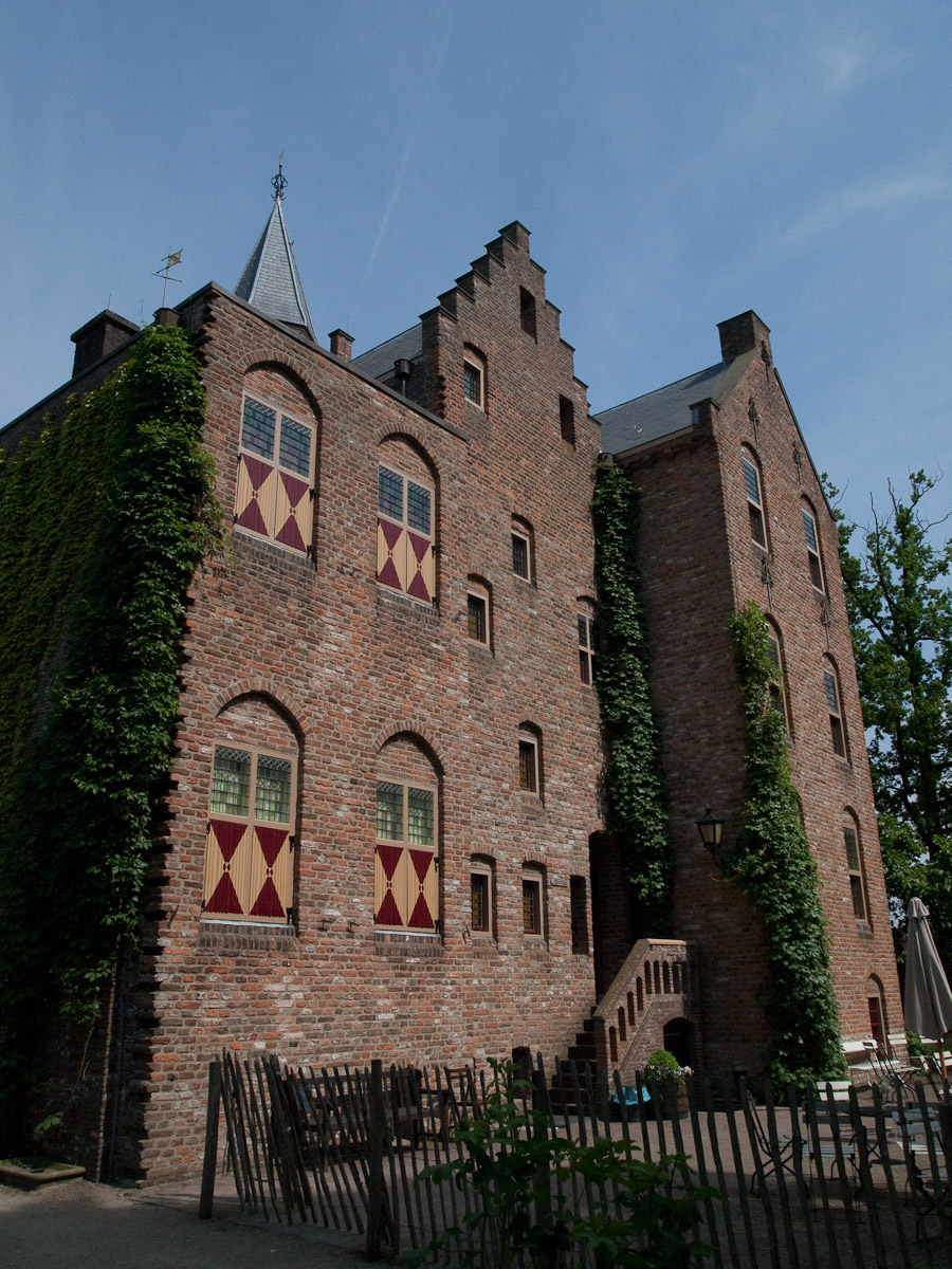 het jongste kasteel van Nederland